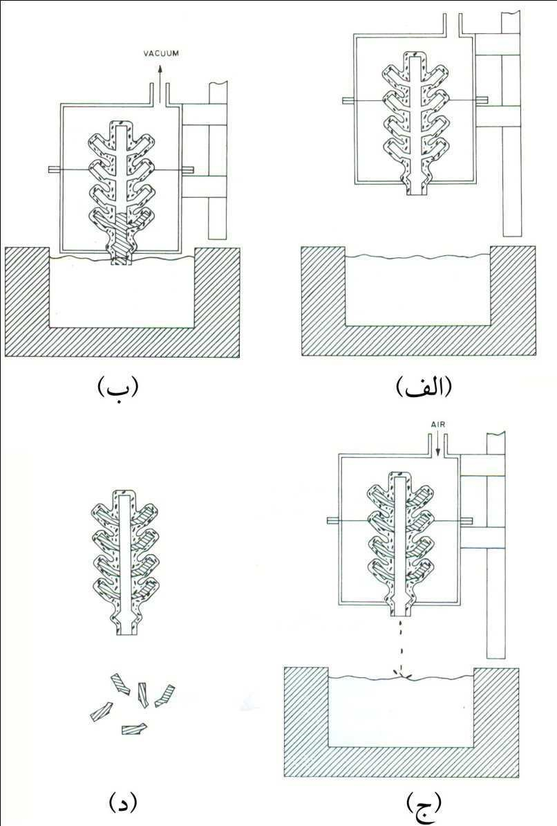 الف) قالب پوسته اي دقيق در اتاقک ريخته گري ب) قالب تا موقعيت ريخته گري پايين آمده و مذاب تحت خلا به درون قالب کشيده مي شود ج) مذاب درون قالب منجمد شده و بيشتر مذاب درون سيستم راهگاهي به درون پاتيل باز مي¬گردد د) قالب و قطعات پس از شکست پوسته سراميکي